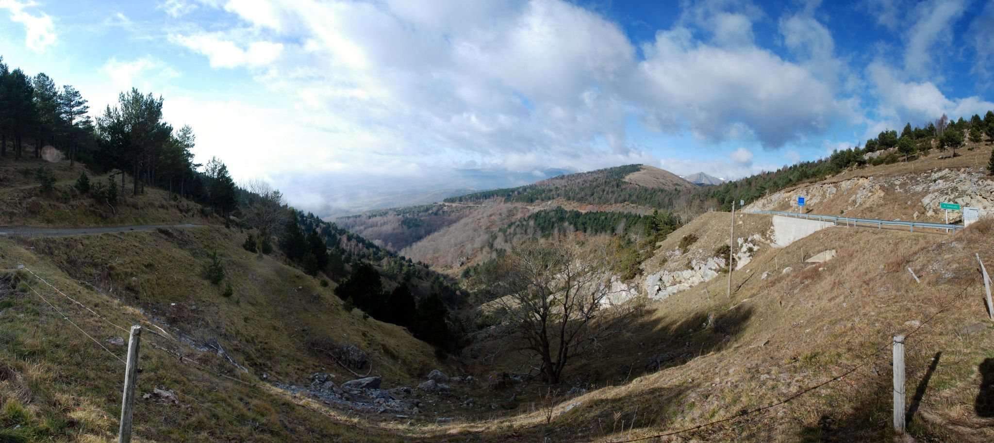 La Vall de Camprodon (Ripollès) des de Coll d'Ares